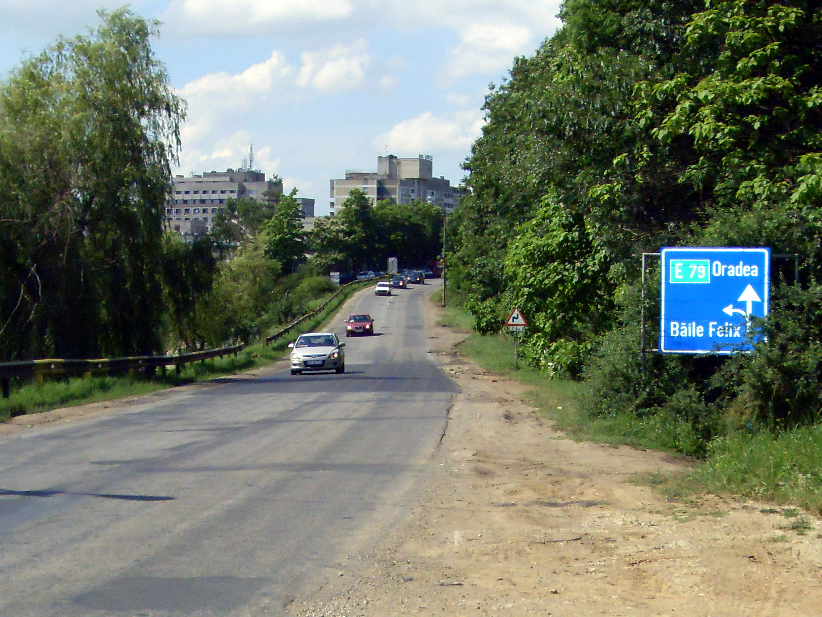 Die Europastraße 79 bei Băile Felix (Bad Felix) im Kreis Bihor, Rumänien.